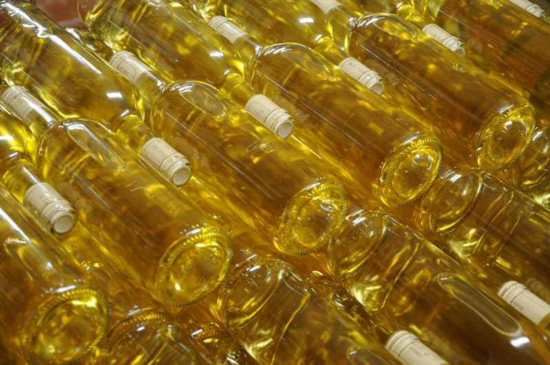 Palette de Jurançon